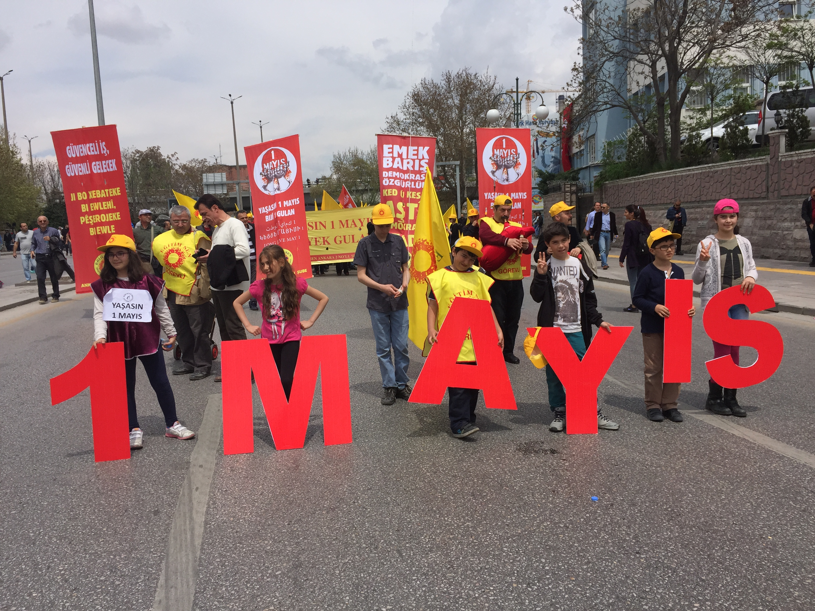 1 May 2015 demonstration